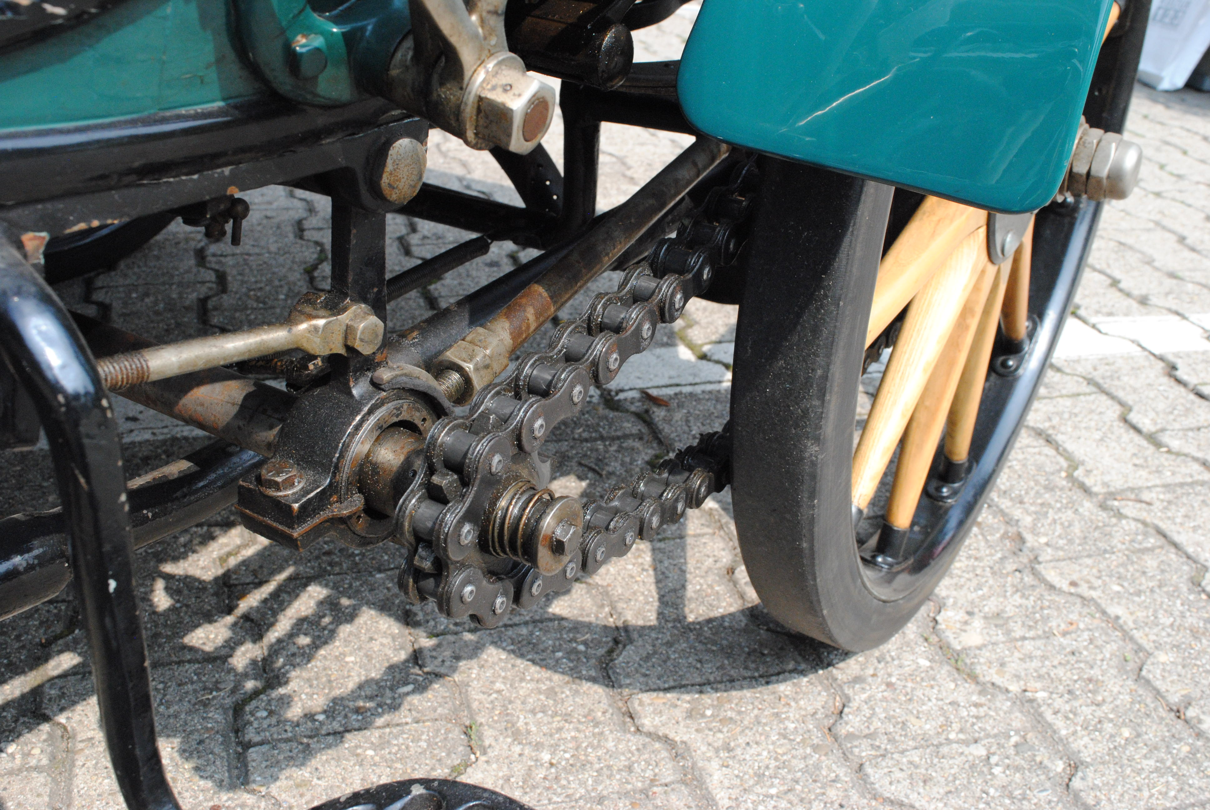 Opel Patentmotorwagen („System Lutzmann“) auf dem Klassikertreffen Rüsselsheim 2017. Detail: Kettenantrieb auf die Hinterräder.